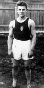 Aleksander Klumberg-Kolmpere